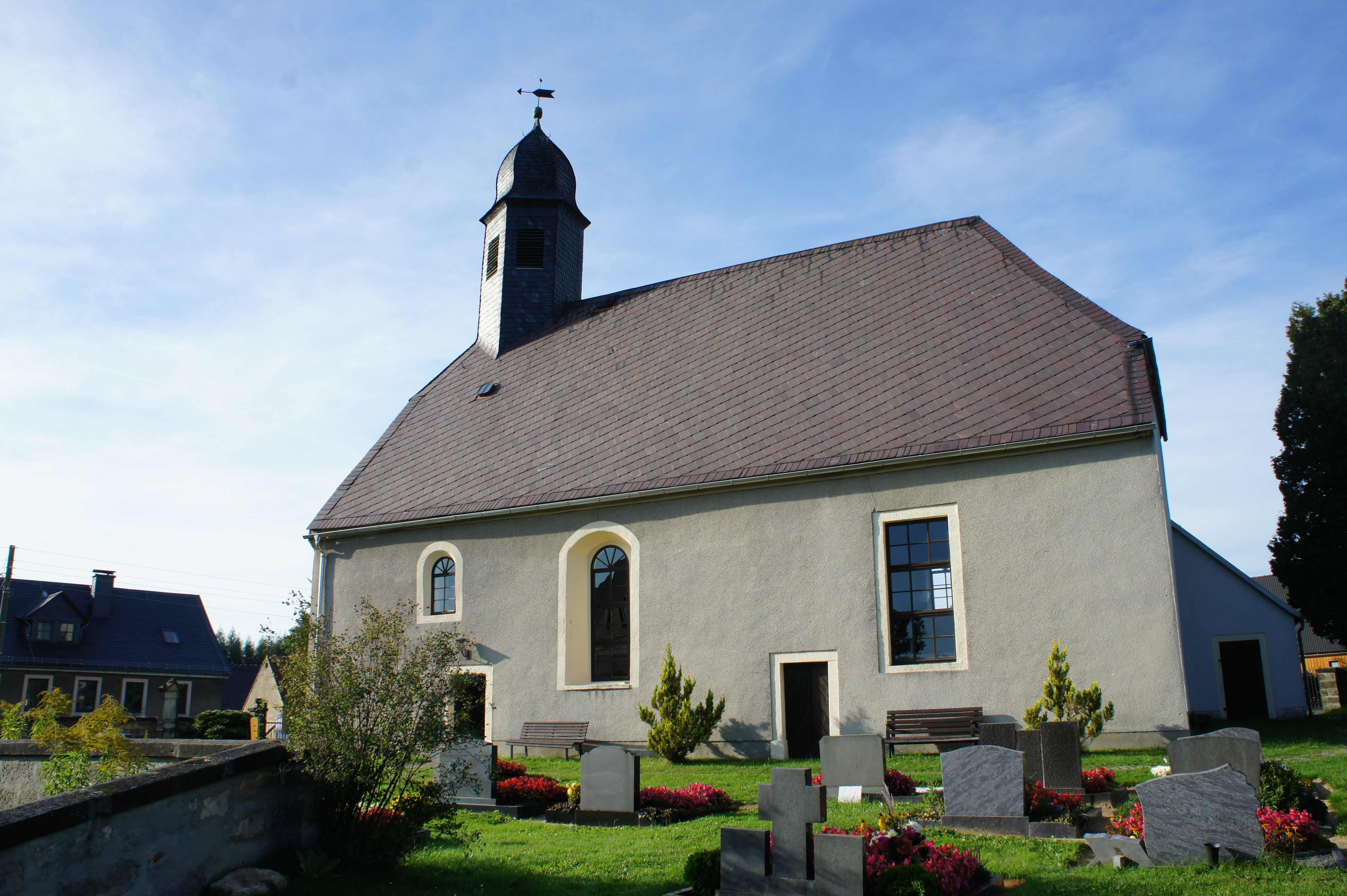 Ev.-luth. Kirche Rückersdorf (Neustadt in Sachsen). Kleine Saalkirche mit geradem Abschluss, Krüppelwalmdach, Rundbogenfenster, Dachreiter mit Haube. Inneres: flache Holzdecke, Kanzelaltar von 1676, umlaufende Emporen und Patronatsloge (ehemaliger Beichtstuhl) mit biblischen Szenen, seltene Farbigkeit blau/rot/grau.